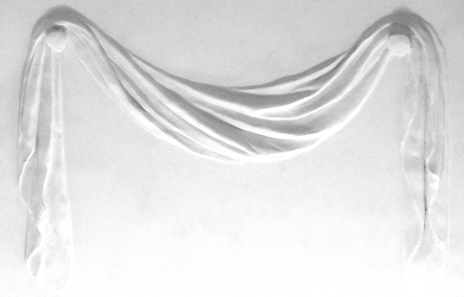 Beispiel der Stuckaturen im Stil des "Louis-seize"; Tuchfeston